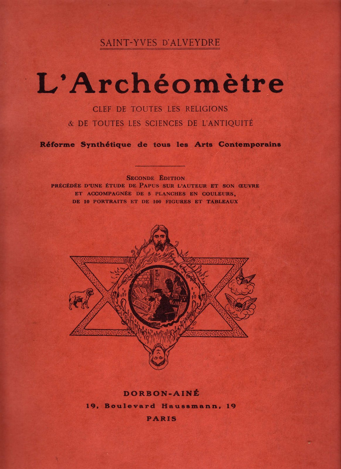 L'ARCHÉOMÈTRE, Clef de toutes les Religions & de toutes les Sciences de l'Antiquité. Réforme Synthétique de tous les Arts Contemporains, seconde édition précédée d'une étude de Papus sur l'auteur et son œuvre et accompagnée de 5 planches en couleurs, de 10 portraits et de 100 figures et tableaux. Éditions Dorbon-Ainé, Paris, sans date, format 25 x 33, broché, 331 pages.